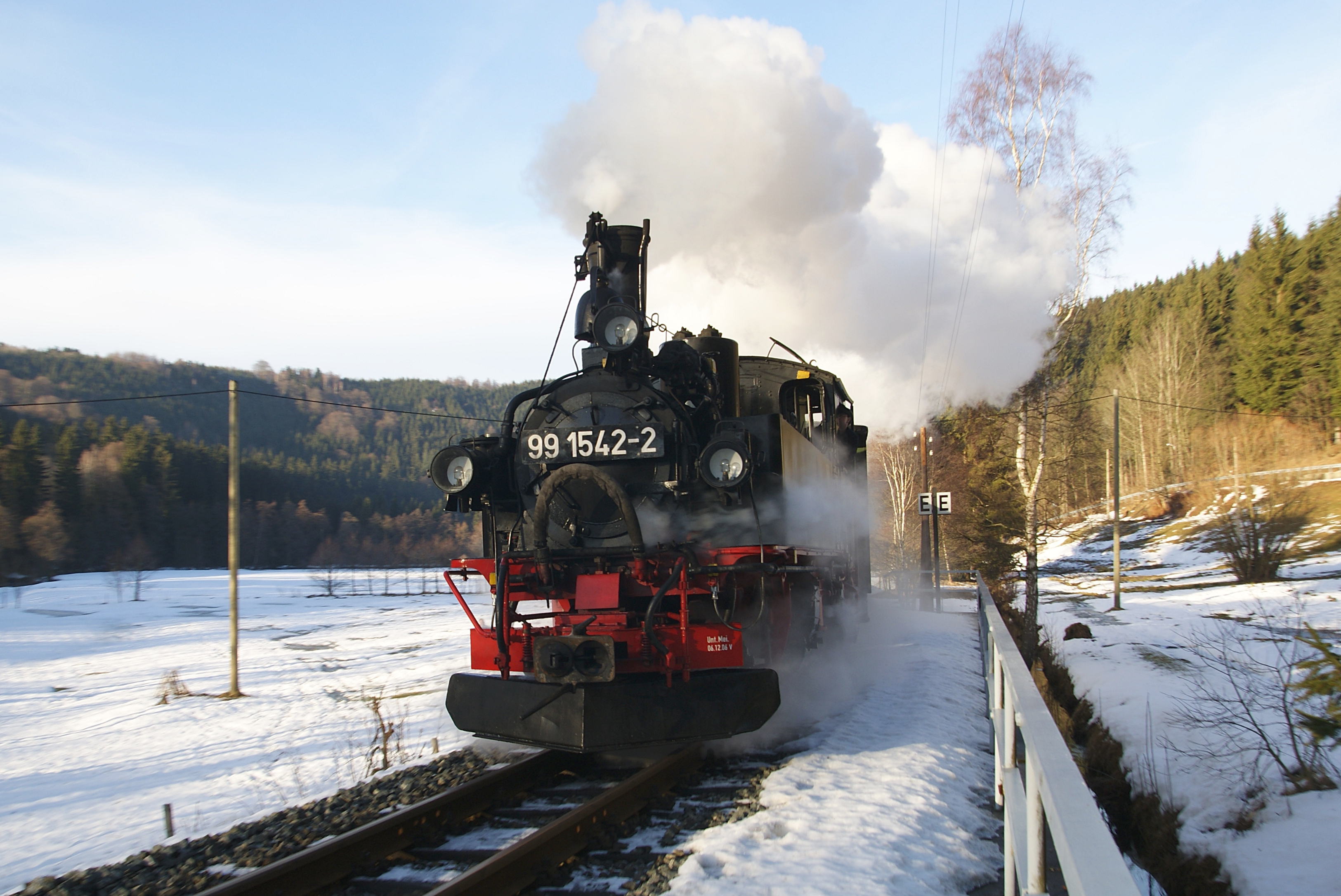 99 1542 Bahnhofseinfahrt Schmalzgrube Pressnitztalbahn